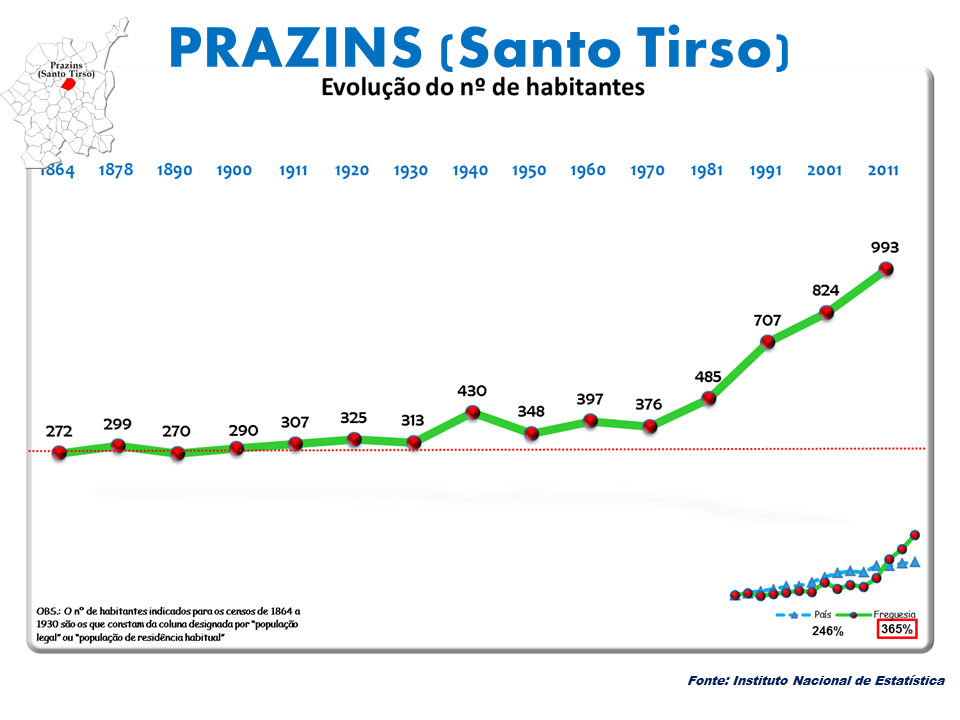 Censo 2011